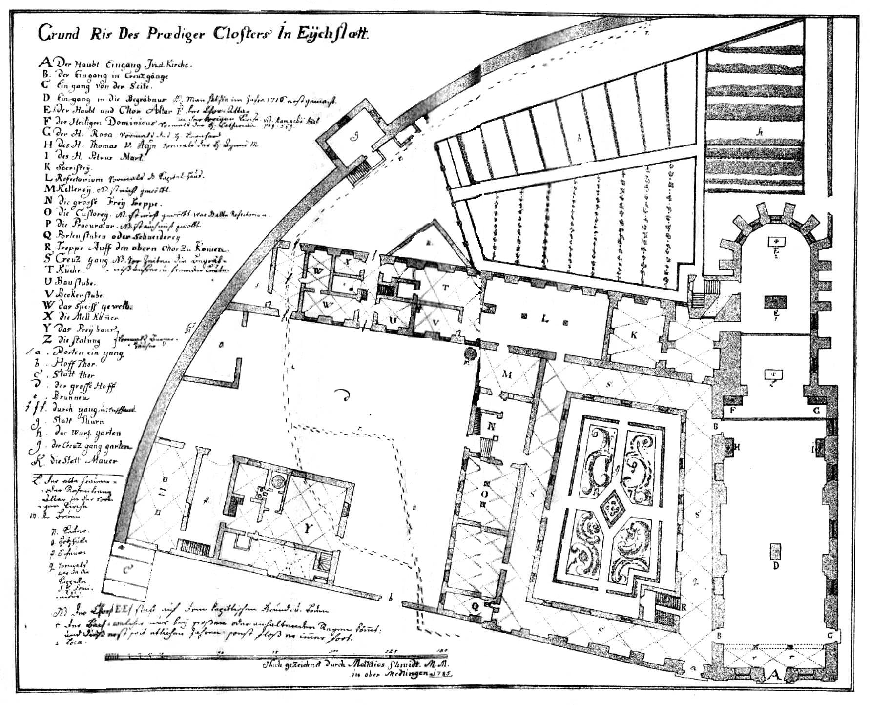 Grundriss_des_Dominikanerklosters_Eichstätt_1785_von_Matthias_Schmidt